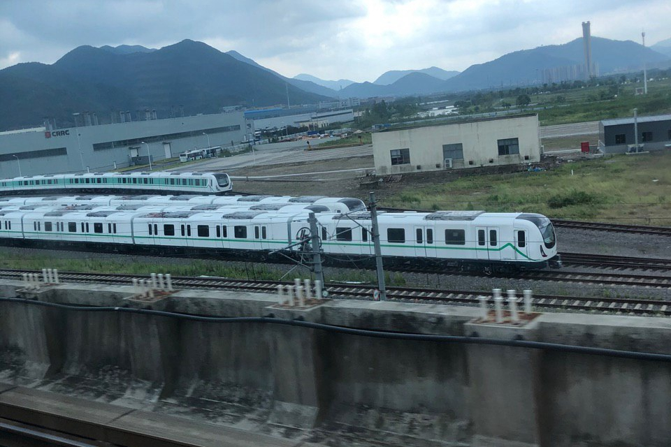 位于宝幢中车工厂内的宁波地铁4号线列车